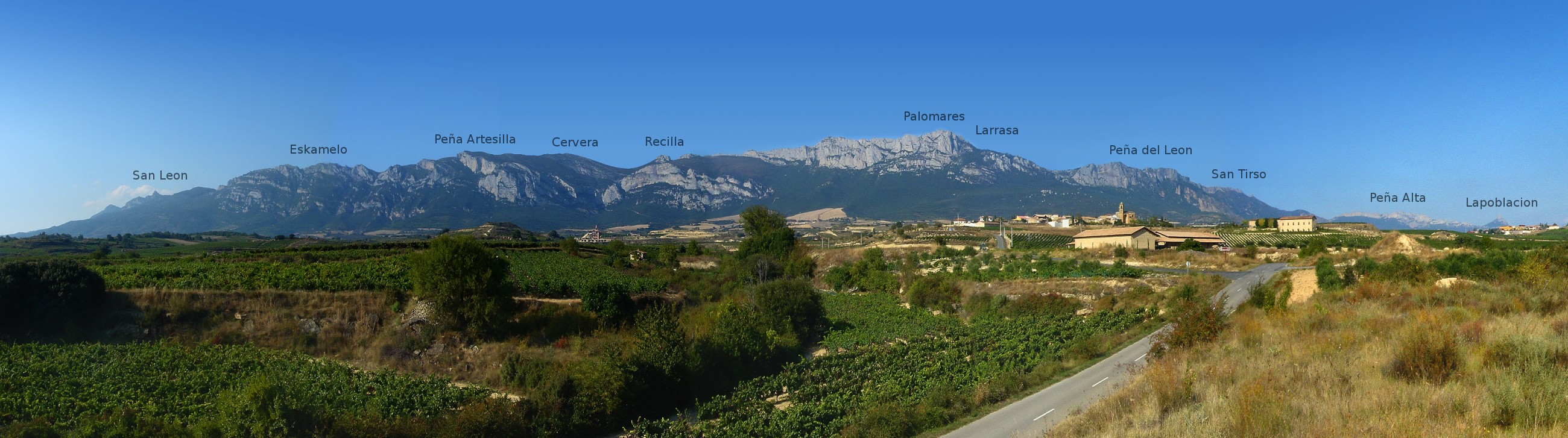 Toloñoko edo Kantabriako mendilerroa (Araba)